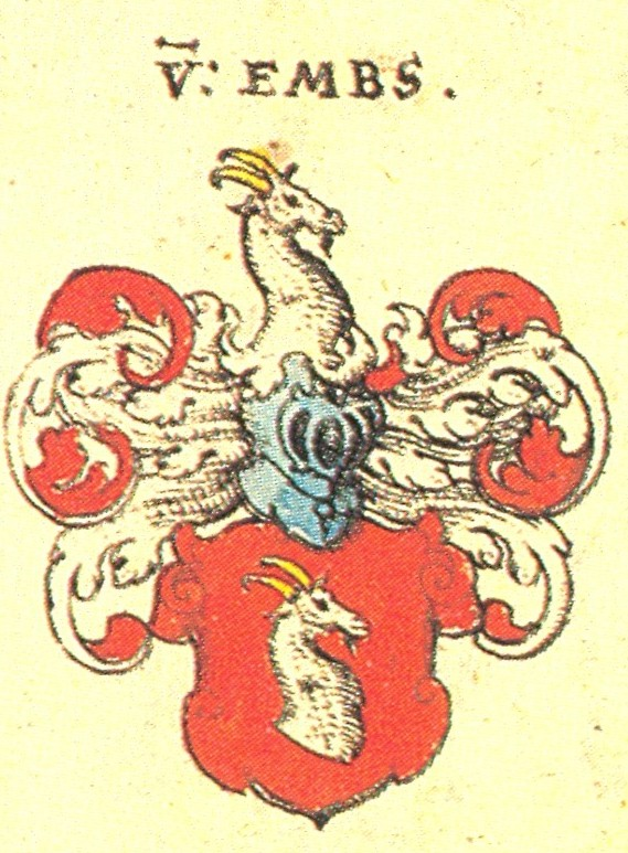 Wappen der fränkischen Adelsfamilie von Embs.